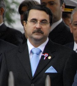 Federico Franco, cuando era vicepresidente de Paraguay.